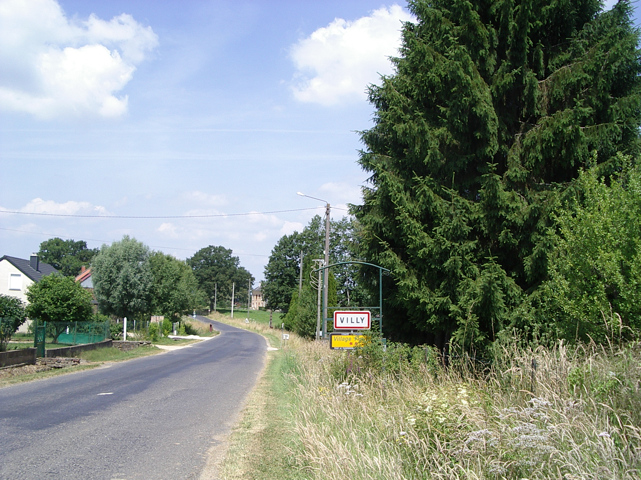 Villy est une commune française, située dans le département des Ardennes et la région Champagne-Ardenne